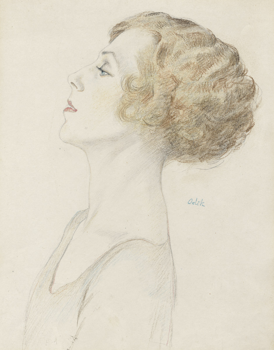 Portrait Hedda Behrens. Bleistift und Farbstifte, leicht gewischt, auf chamoisfarbenem Velin. 34 x 25,5 cm. Mittig rechts in Blau gepauste Signatur. Um 1921.